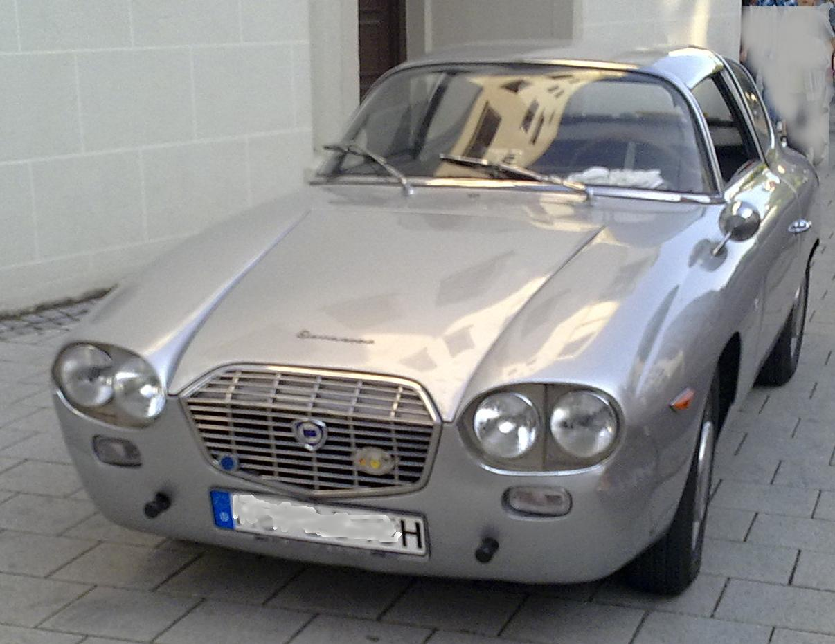 Lancia